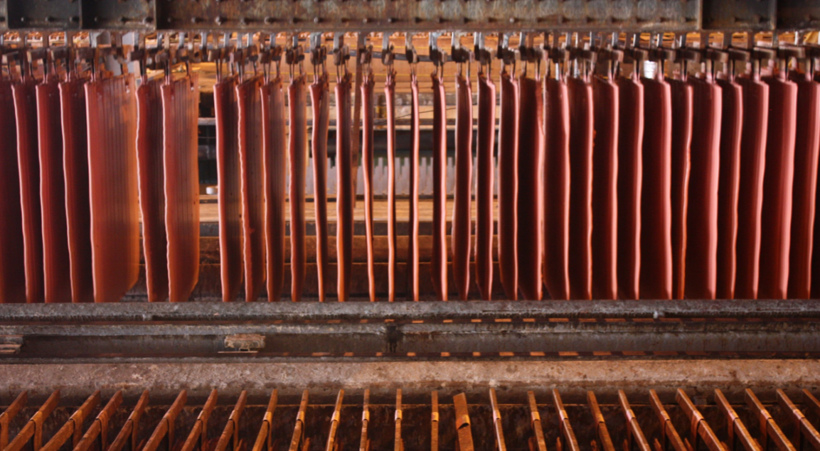 بنده این عکس را در بازدیدی که در سال گذشته از شرکت مس سرچشمه داشته ام گرفته ام